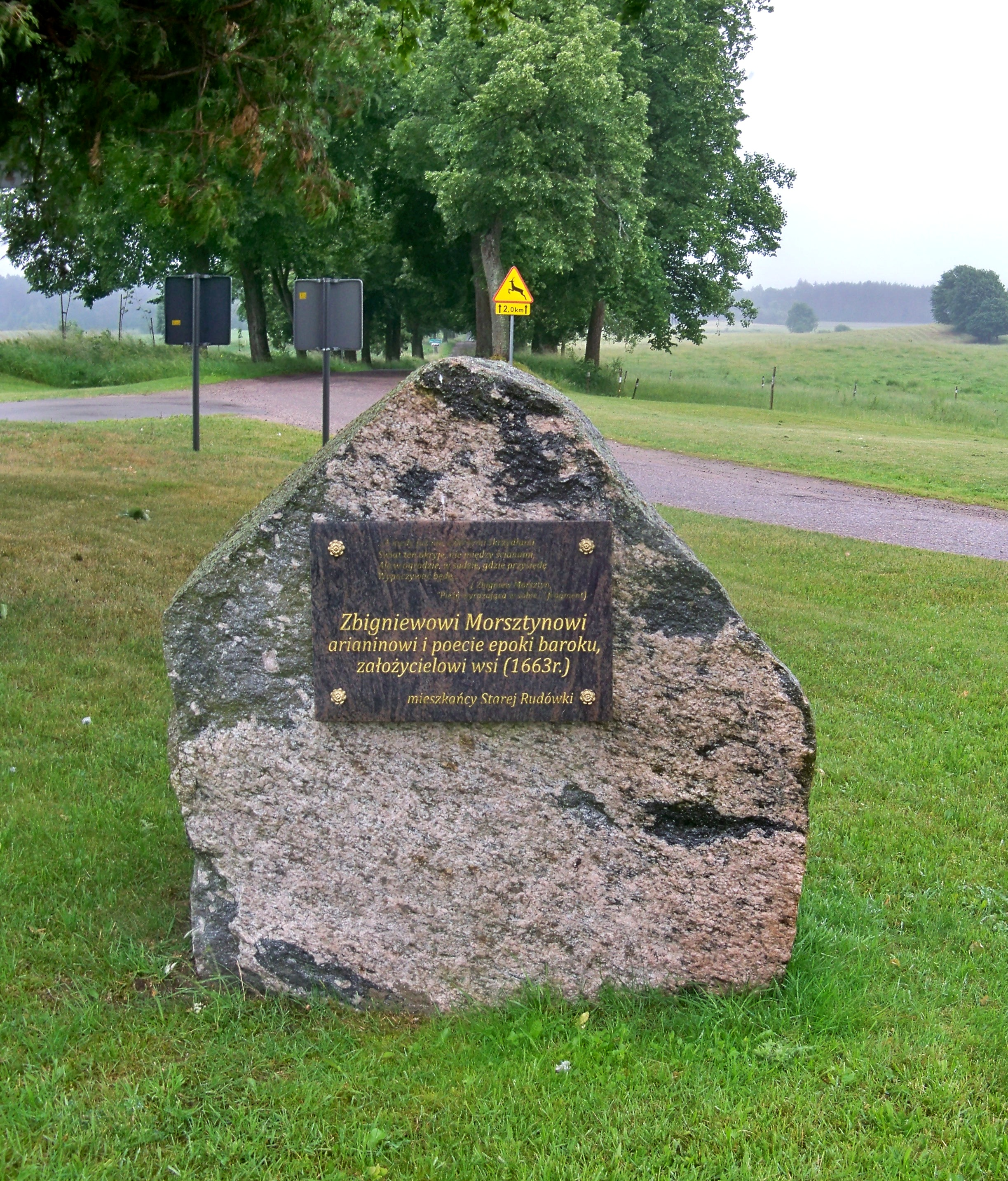 Stara Rudówka, skrzyżowanie głównej ulic wsi z drogą do Szymonki. Kamień pamiątkowy poświęcony Zbigniewowi Morsztynowi.